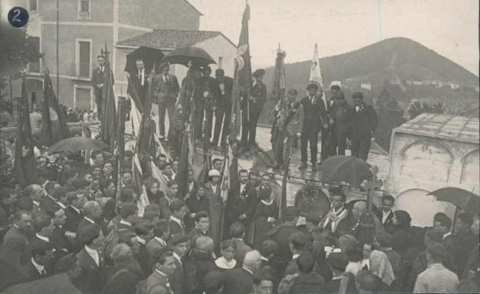 "Aplec" jaimista en San Fausto de Campcentellas